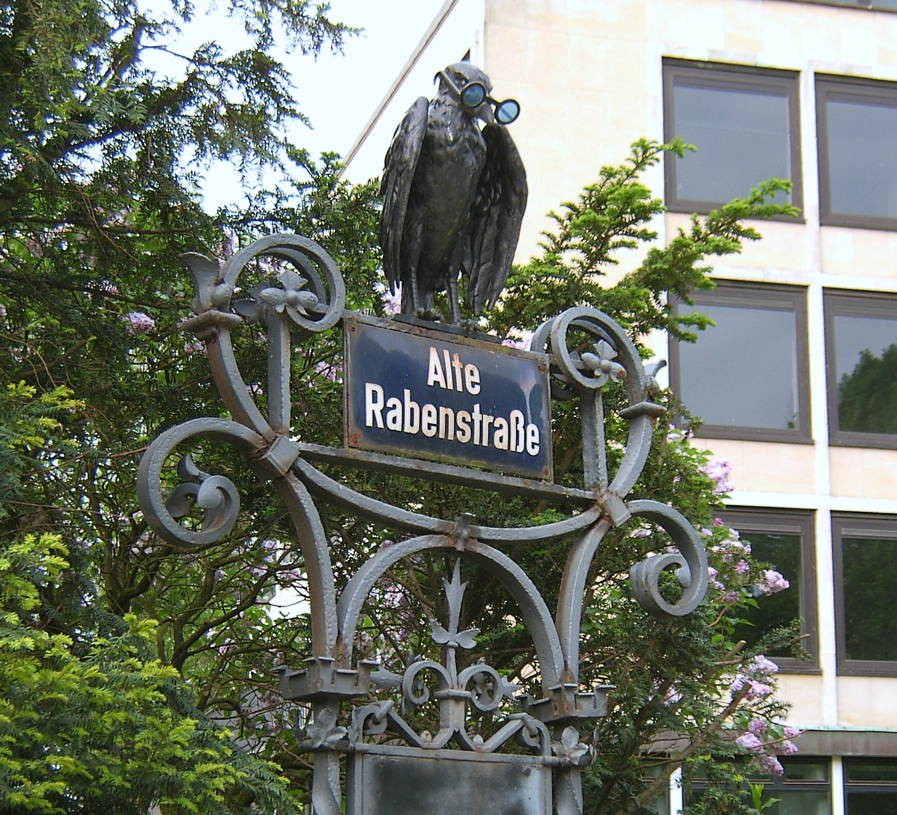 Hamburg, Rotherbaum, Alstervorland, Straßenschild "Alte Rabenstraße"